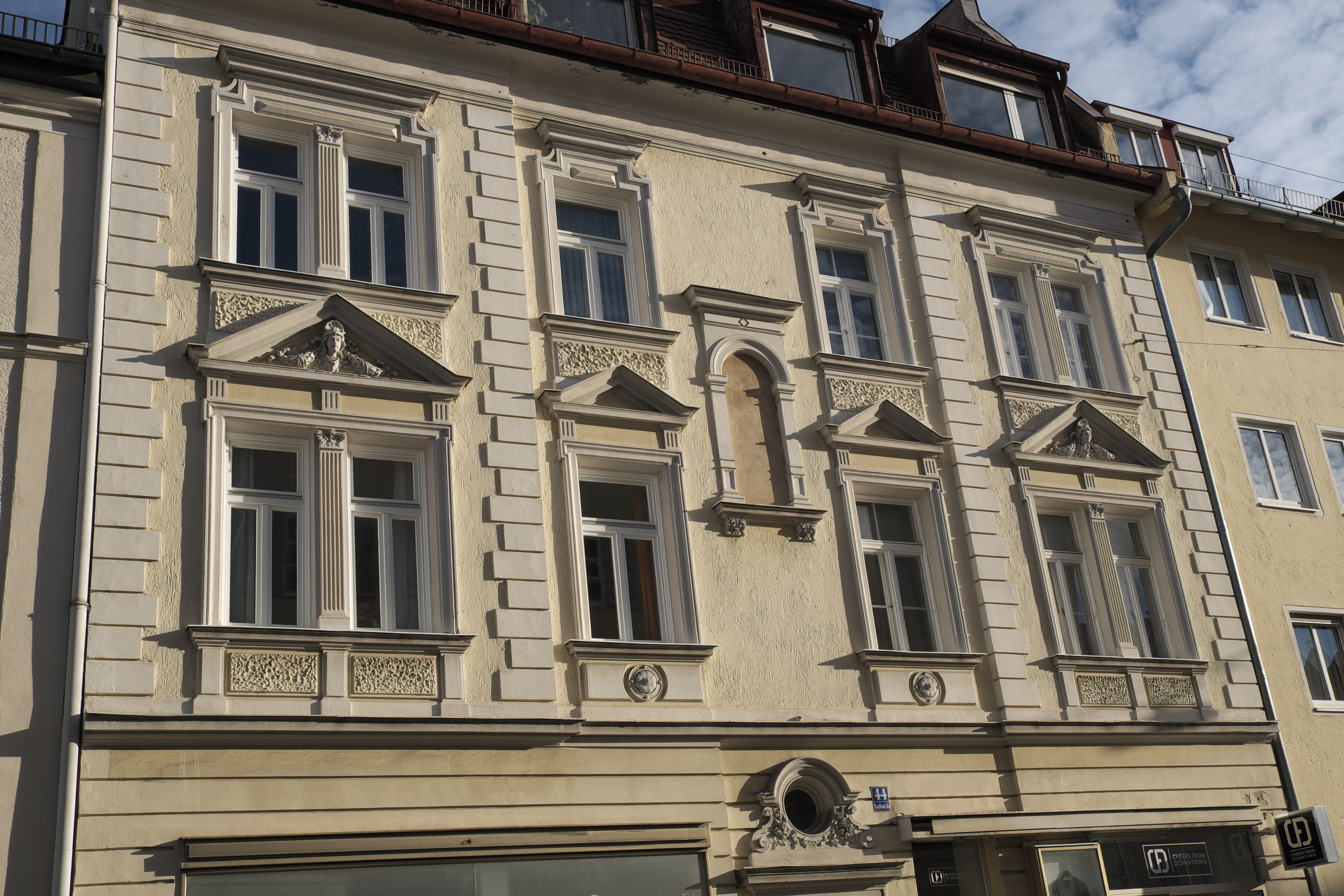 Mietshaus in der Kaulbachstraße 44 im Stadtbezirk Maxvorstadt in München (Bayern/Deutschland), Ende 19. Jahrhundert